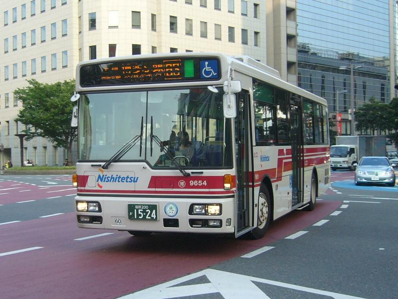 登録番号 福岡200か15-24 西日本鉄道博多営業所所属 車番9654 2007年7月30日 天神北交差点にて撮影